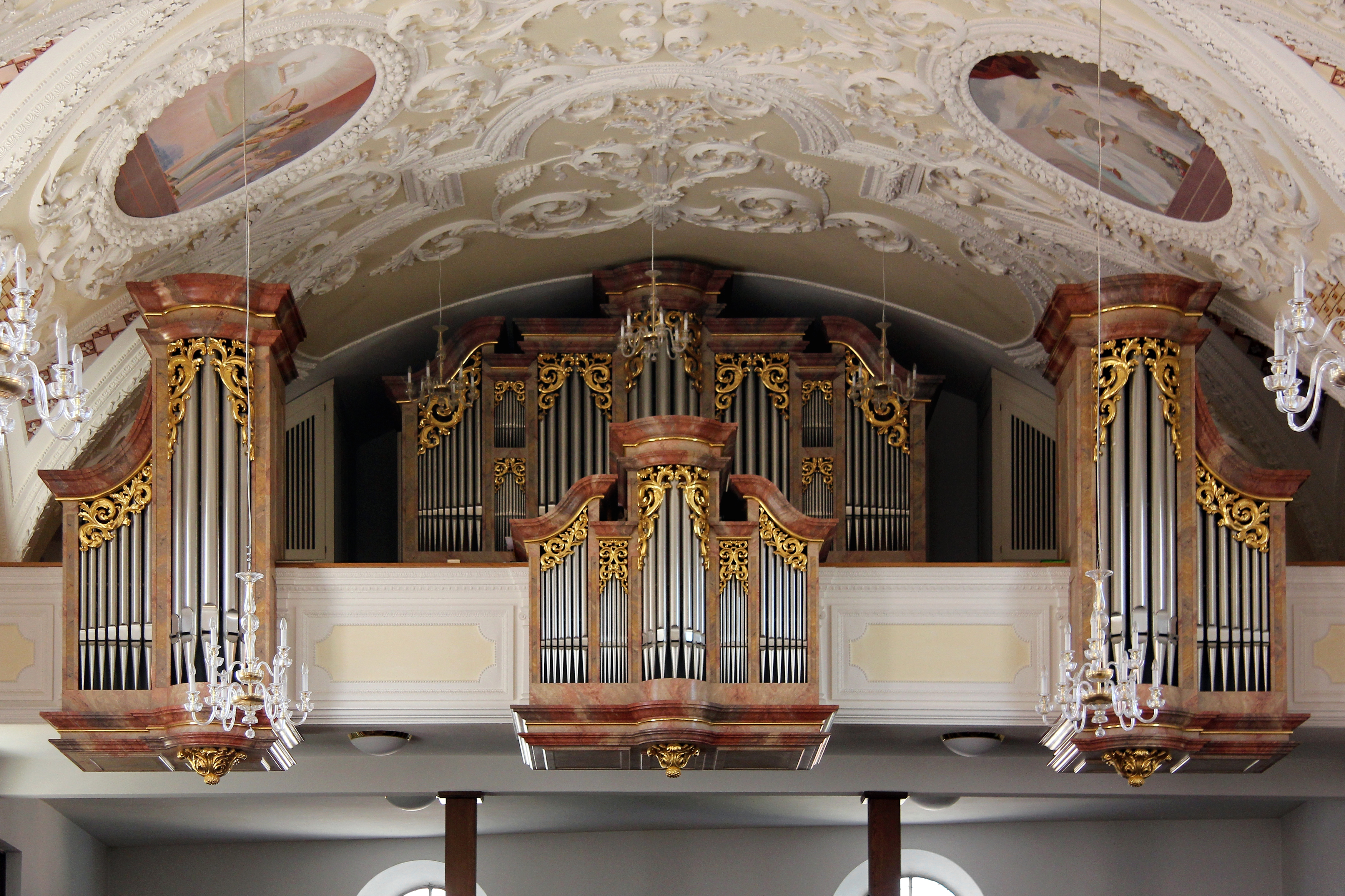 Orgel Pfarrkirche St. Justina, Bad Wörishofen; 1991 erbaut von Klais, 3 Manuale und Pedal, 43 Register, 2867 Pfeifen